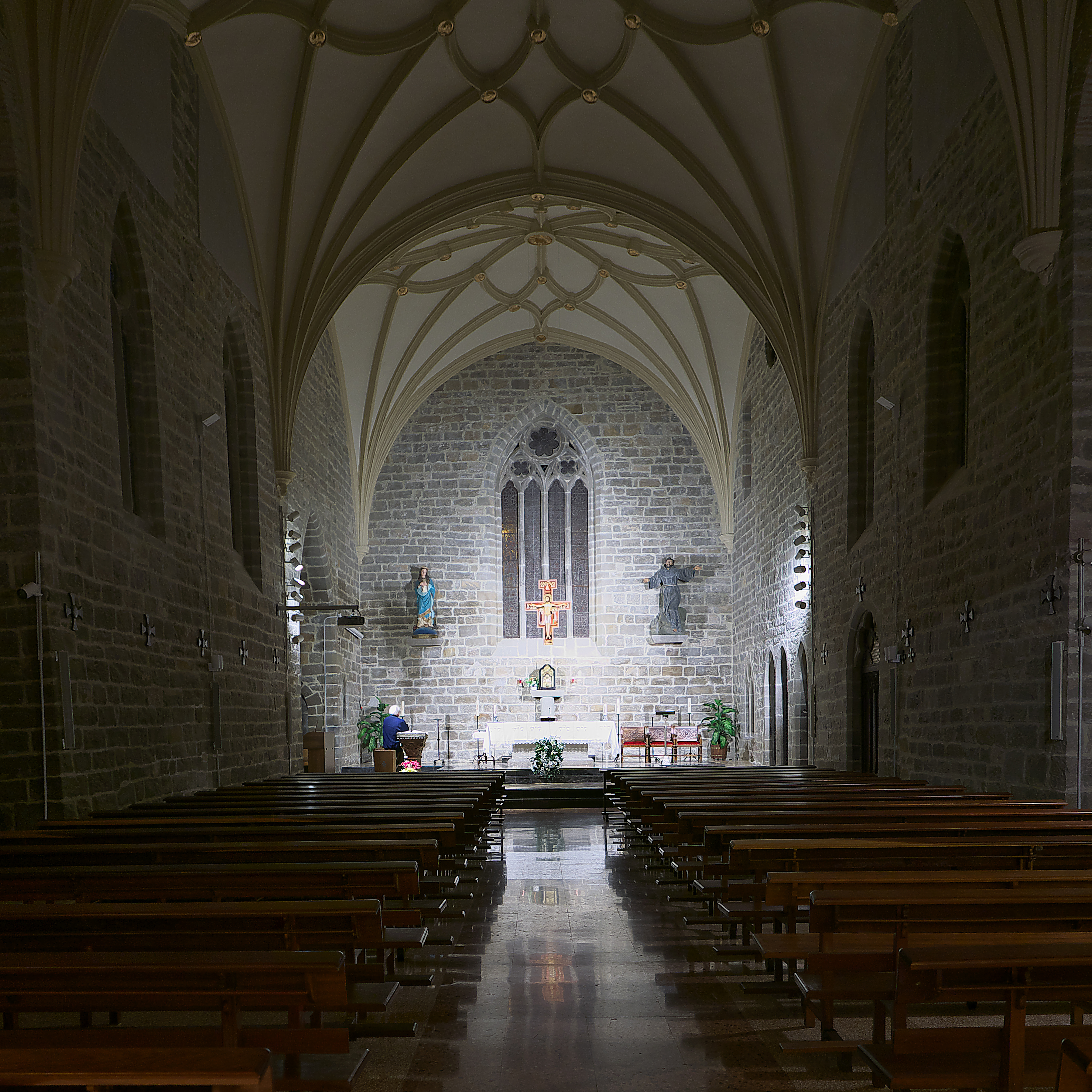 Interior del templo gótico, mediados del XIII.